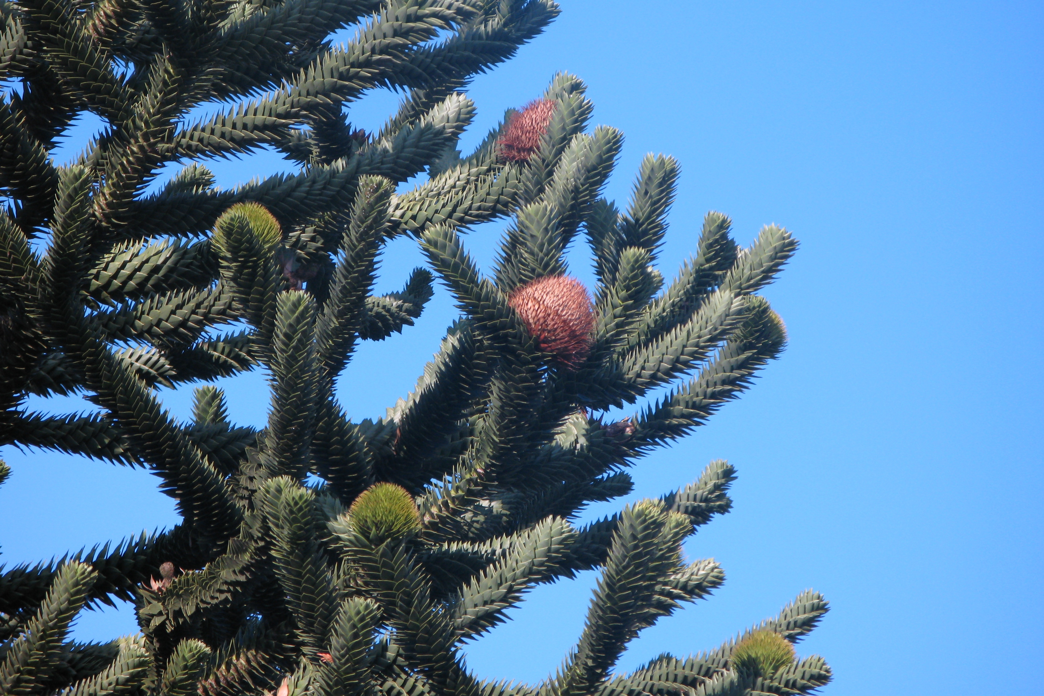 Afebam mat Friichten Detail.